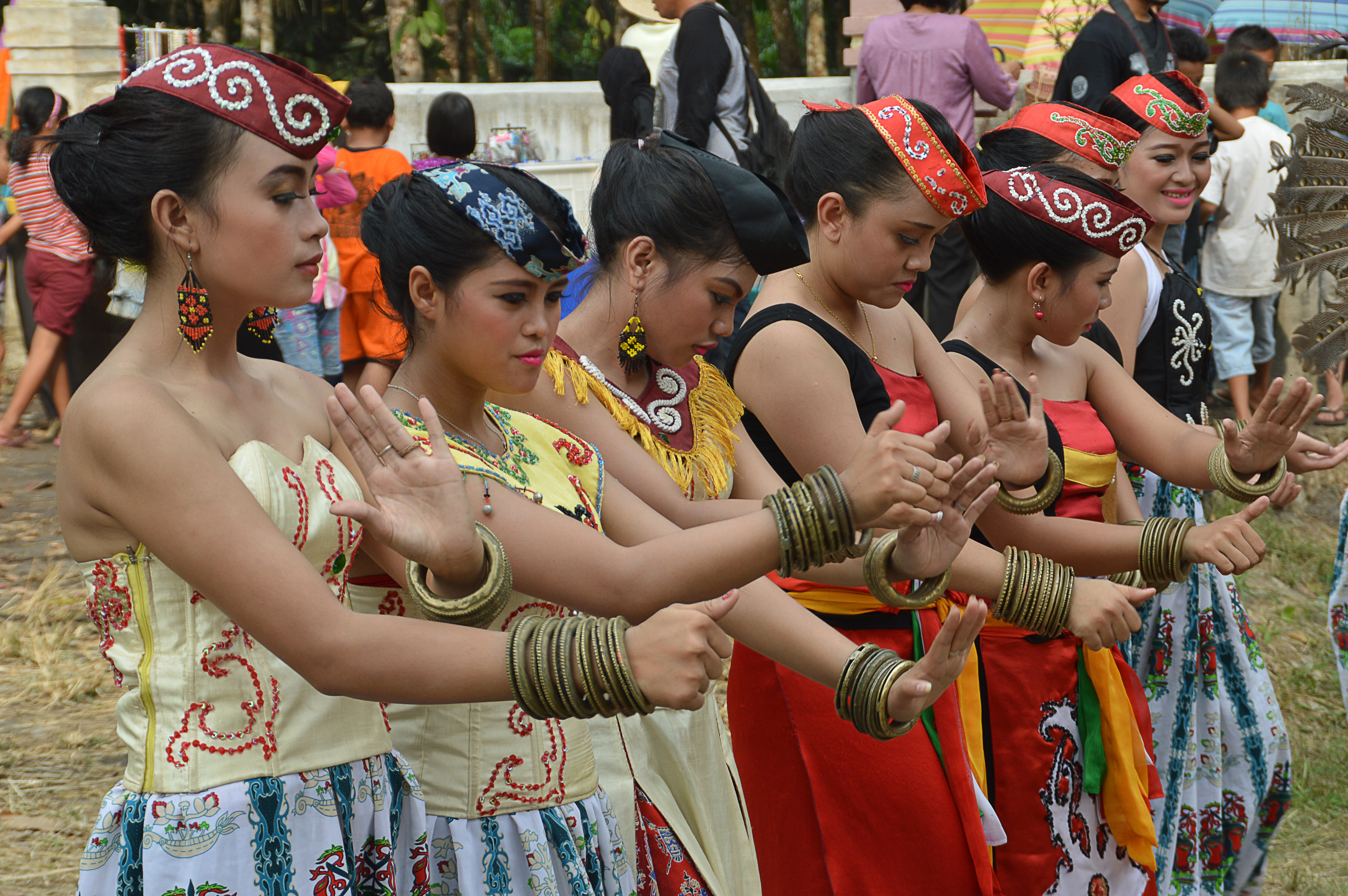 Remaja wanita Dayak Maanyan sedang menari di Keang Ethnic Festival tahun 2015.